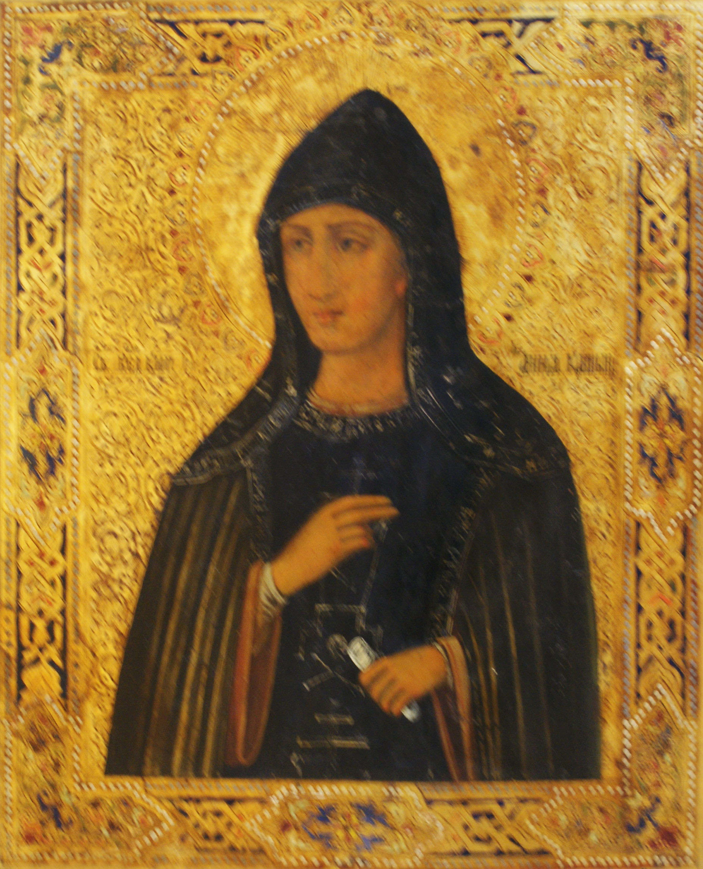 Абраз "Св. Прападобная Ганна Кашынская", Расія, дрэва, ляўкас, змешаная тэхніка